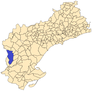 Situación de Horta de Sant Joan en la provincia de Tarragona.